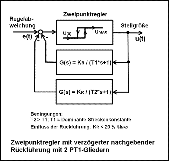 Zweipunktregler mit verzögernd nachgebender Rückführung